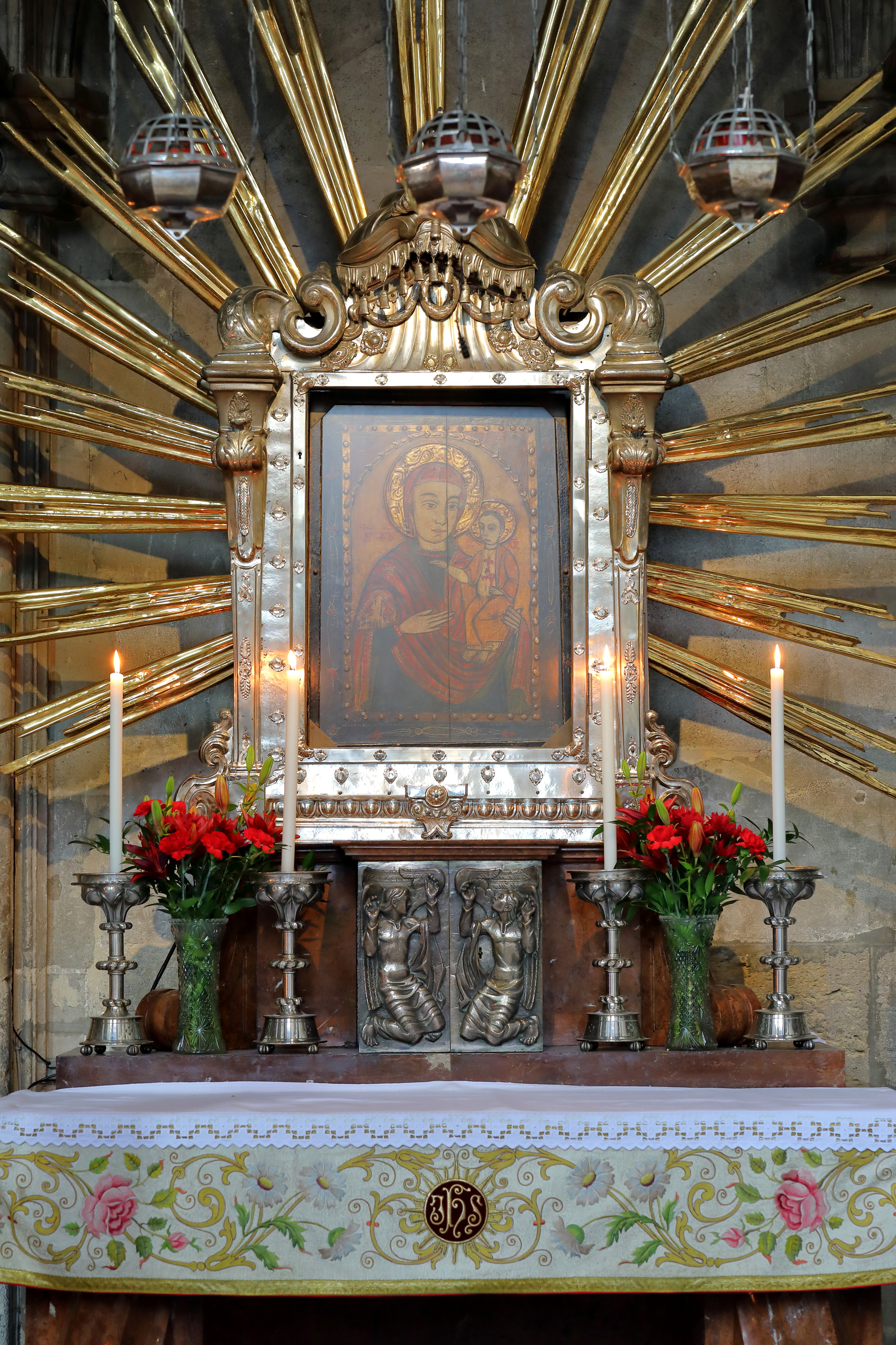 Die Altar mit dem Gnadenbild Maria Pötsch (Madonna von Pötsch/Pócs) im rechten Seitenschiff (Apostelschiff) des Stephansdoms in der österreichischen Bundeshauptstadt Wien.Das Bildnis ist nach seinem Herkunftsort Pócs (dt.: Pötsch) in Nordungarn benannt und wurde 1676 von Stephan Pap gemalt. 1696 vergoss es dort in der Dorfkirche angeblich Tränen und wurde dann 1697 beim Hochaltar des Stephansdoms aufgestellt. 1945 erfolgte der Transfer an den jetzigen Ort unter dem spätgotischen Öchsel-Baldachin.